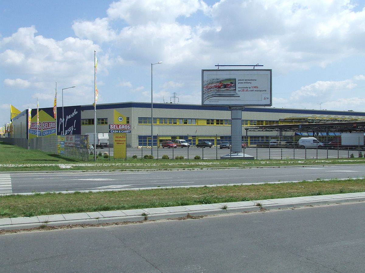 Ulica Połczyńska w Warszawie